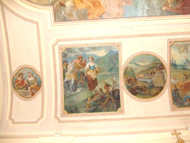 Pfarrkirche Mariä Himmelfahrt, Nesselwängle, Tirol